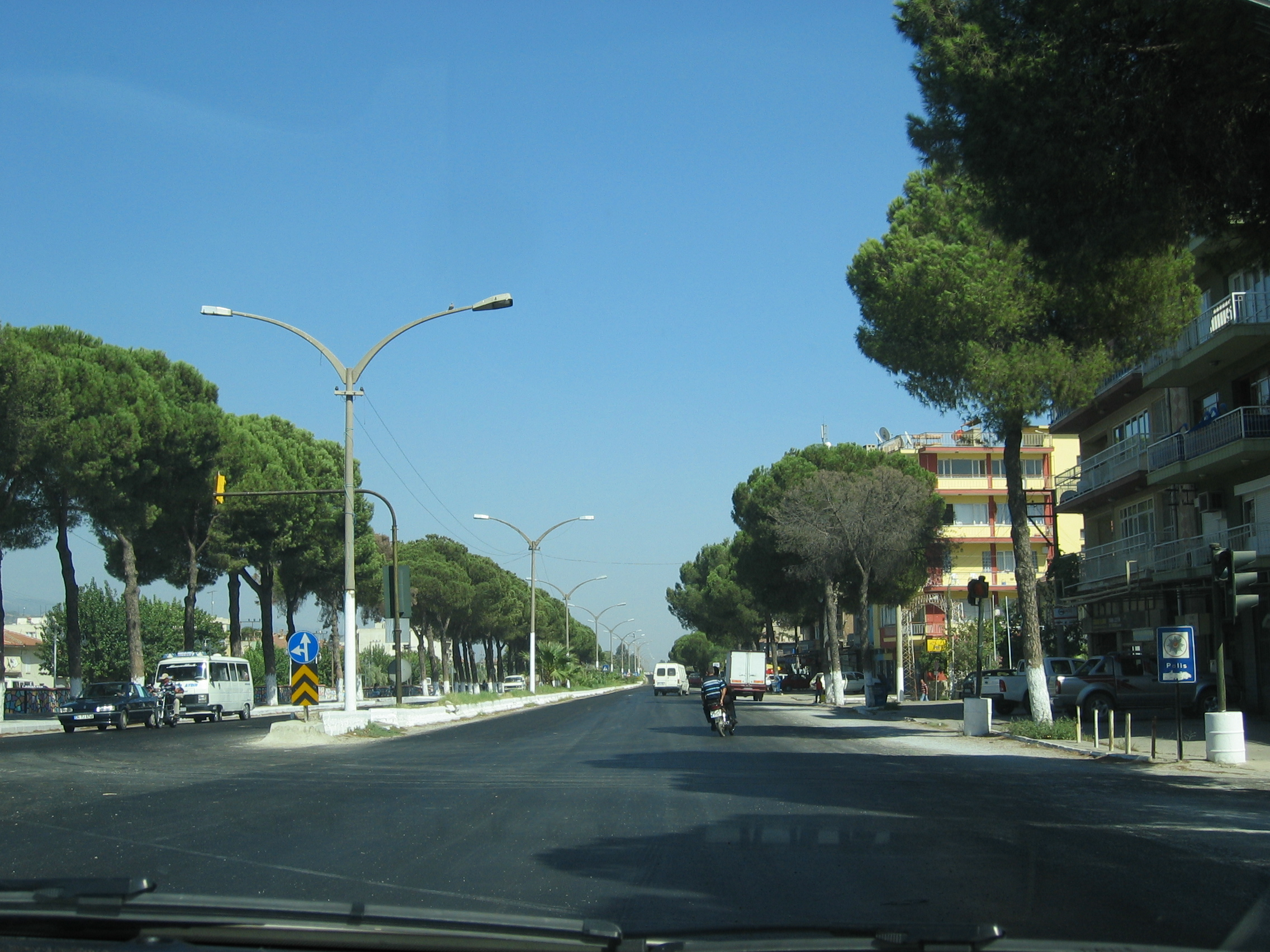 GERMENCIK (Anayol)